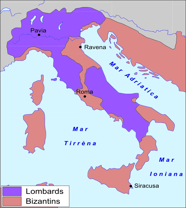 Partiment d'Itàlia entre Lombards e Bizantins.